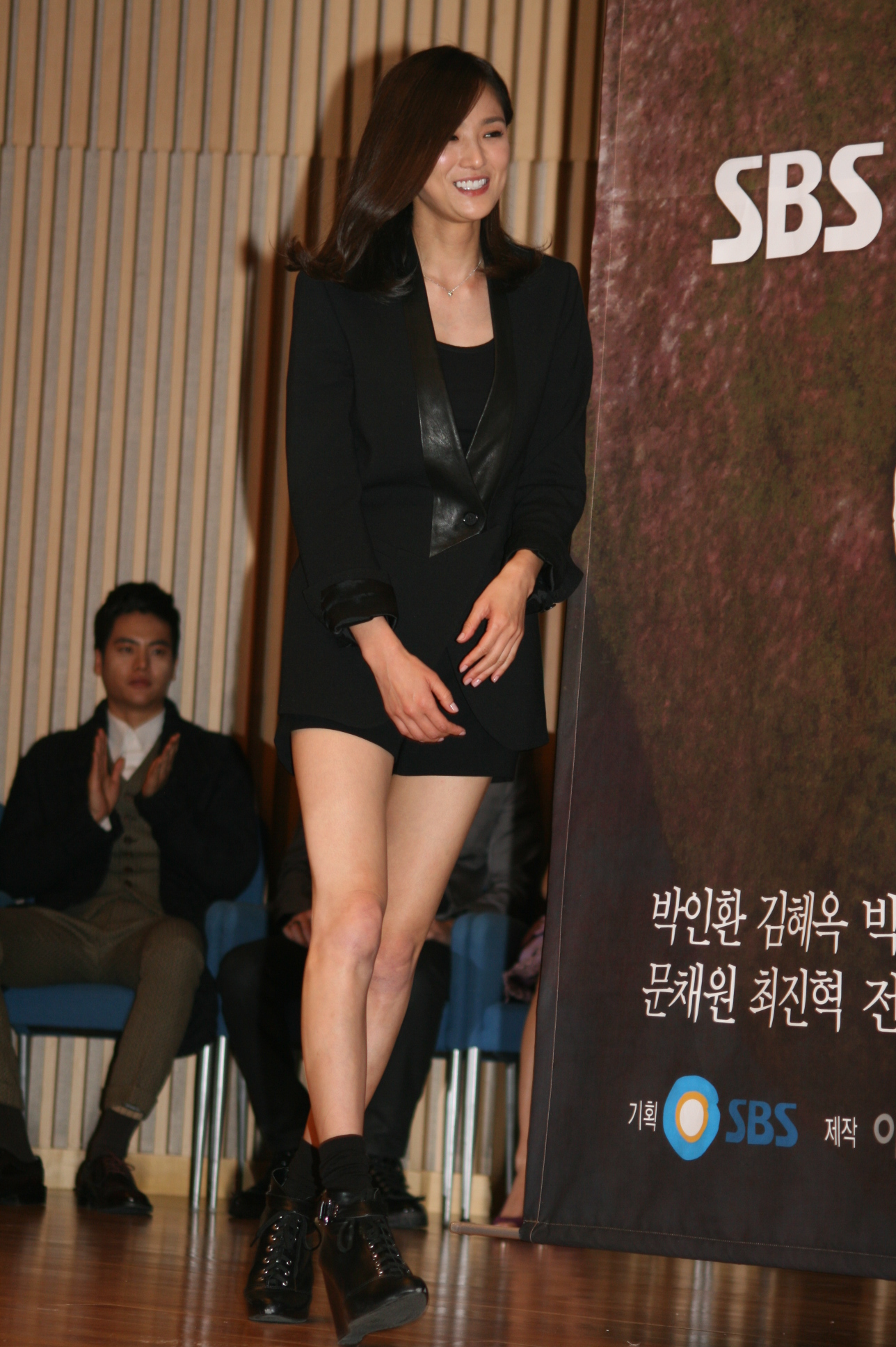 괜찮아 아빠딸 제작발표회